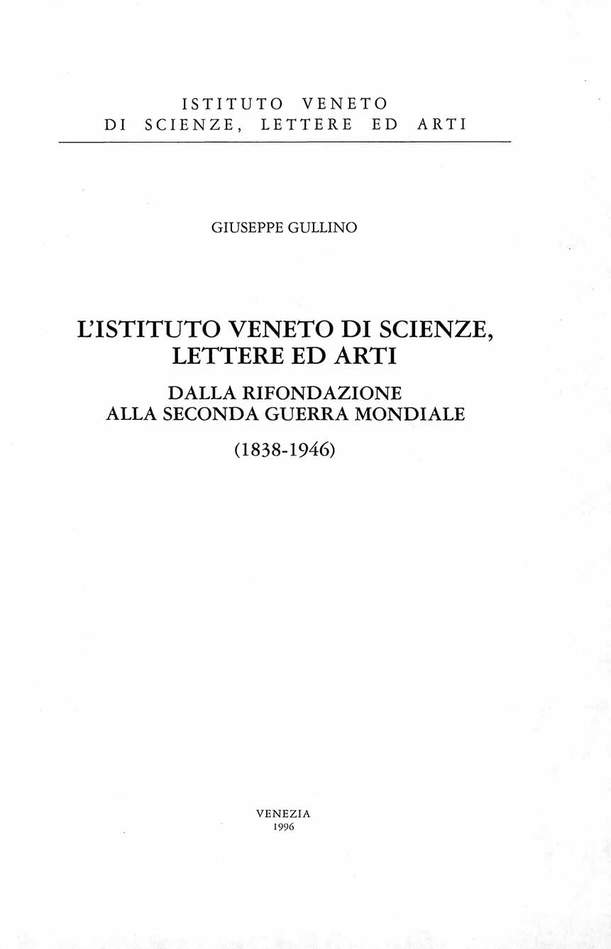 L'Istituto veneto di scienze, lettere ed arti : dalla rifondazione alla seconda guerra mondiale, 1838-1946 / Giuseppe Gullino. - Venezia : Istituto veneto di scienze lettere ed arti, 1996. - XII, 580 p., [22] c. di tav. : ill. ; 24 cm .